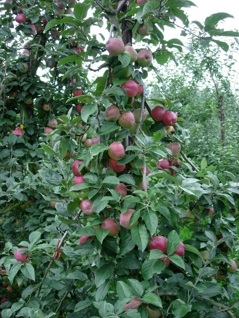 Malus domestica Appelboom Zoete Ermgaard foto eigen werk Snoop